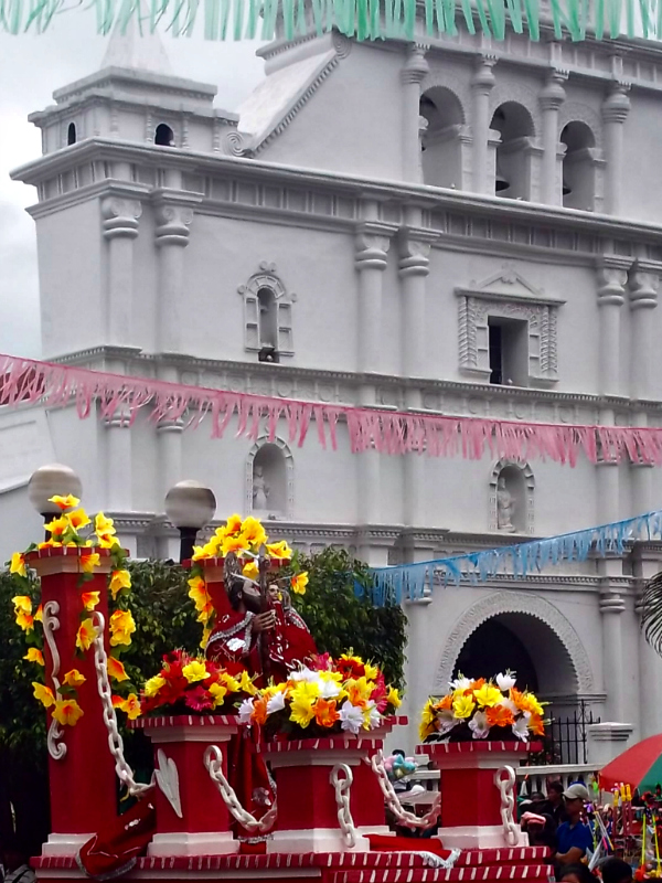 Cortejo de San Cristóbal Mártir el 25 de Julio, fecha de la Fiesta Patronal de la Villa Sancristobalence